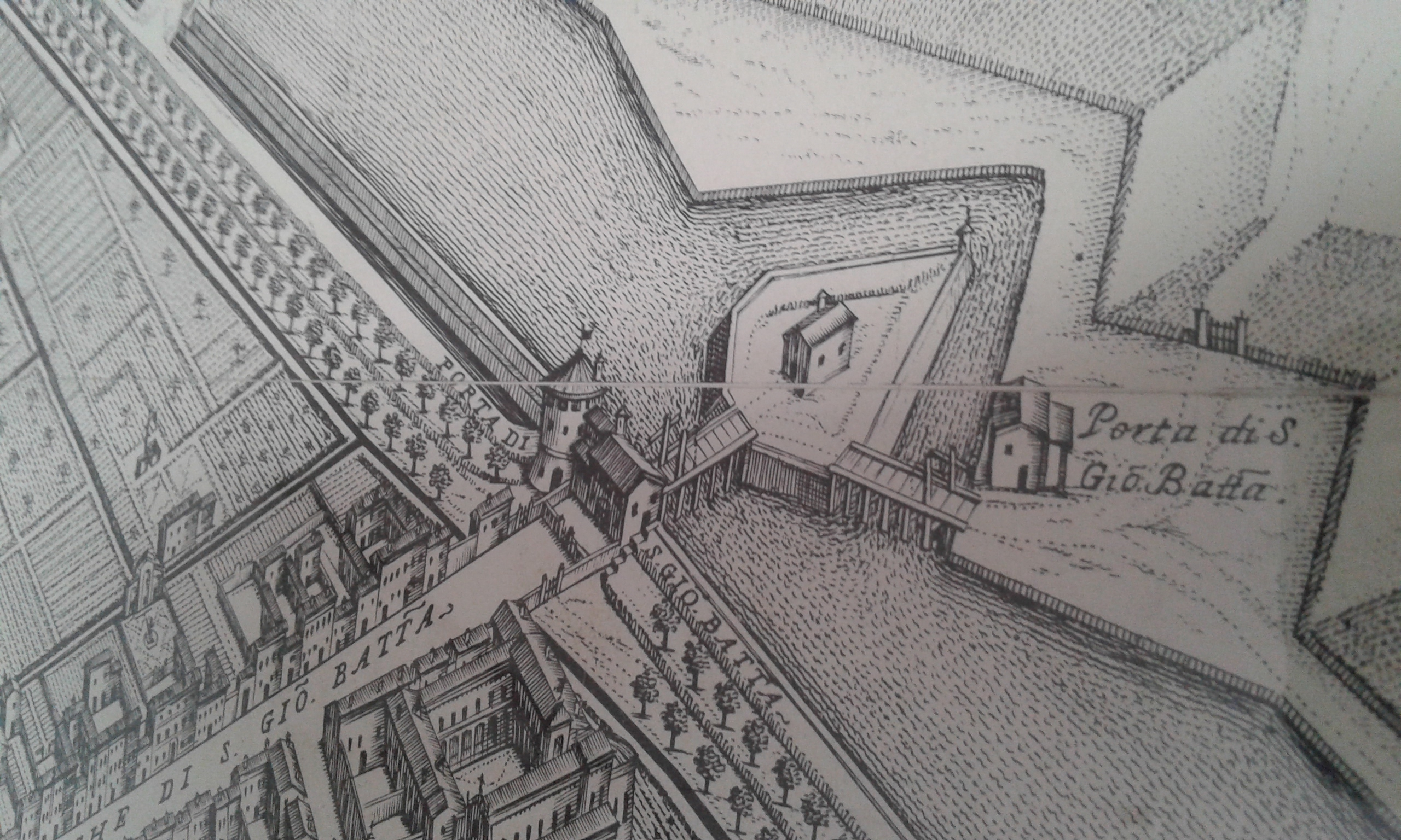 Porta Mare detta anche Porta S. Giovanni Battista